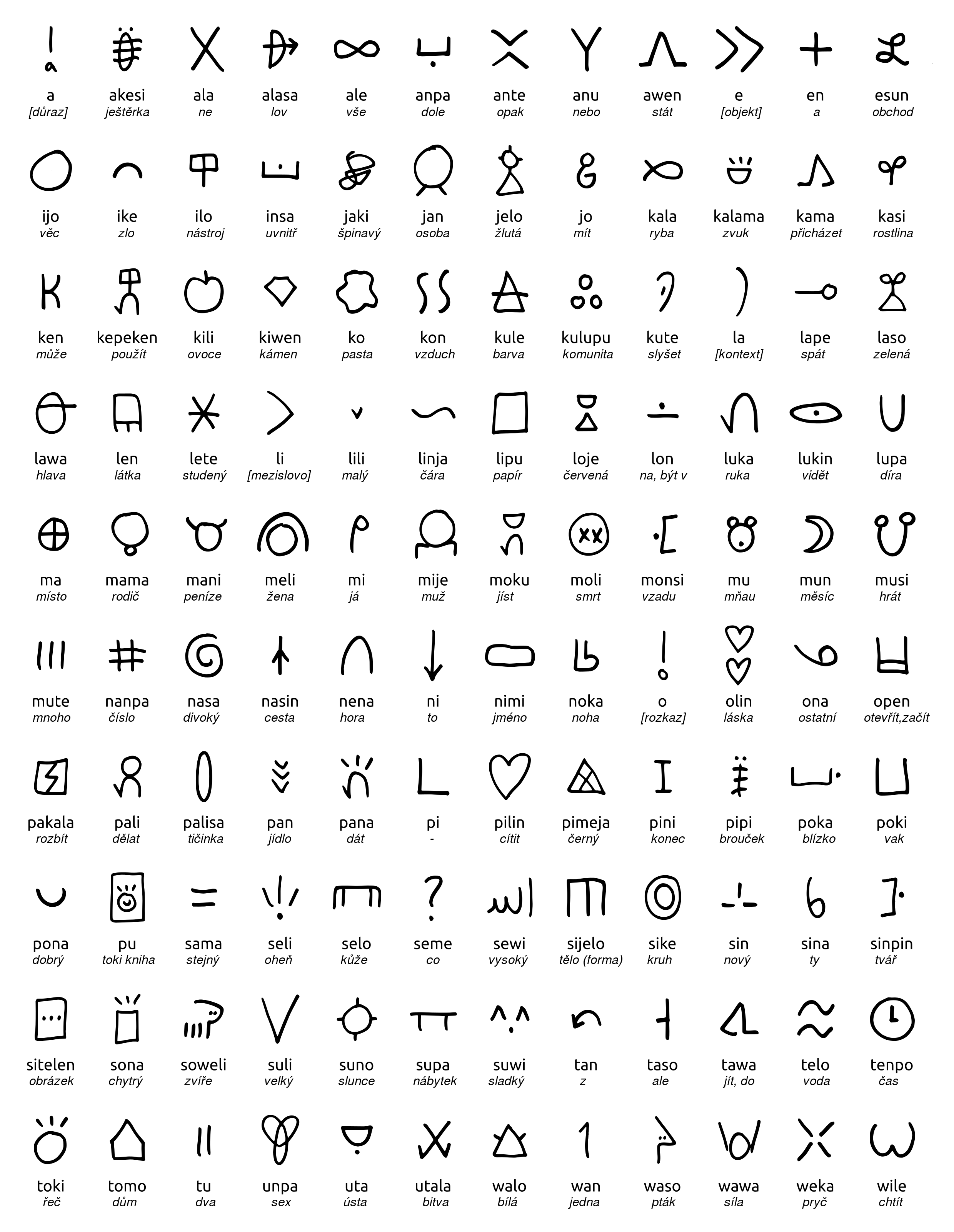 Zjednodušená tabulka všech celé slovní zásoby jazyka Toki pona. U každého slovo je zápis latinkou, pomocí hieroglyfického systému "sitelen pona" a český zjednodušený jednoslovný překlad.